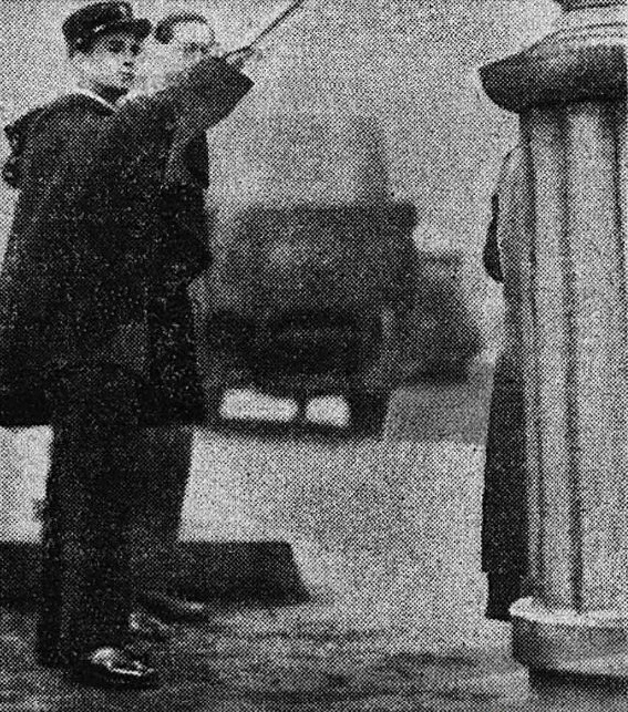 Georges Guillez en 1934, de profession gardien de la paix (ici rue Lafayette à Paris).